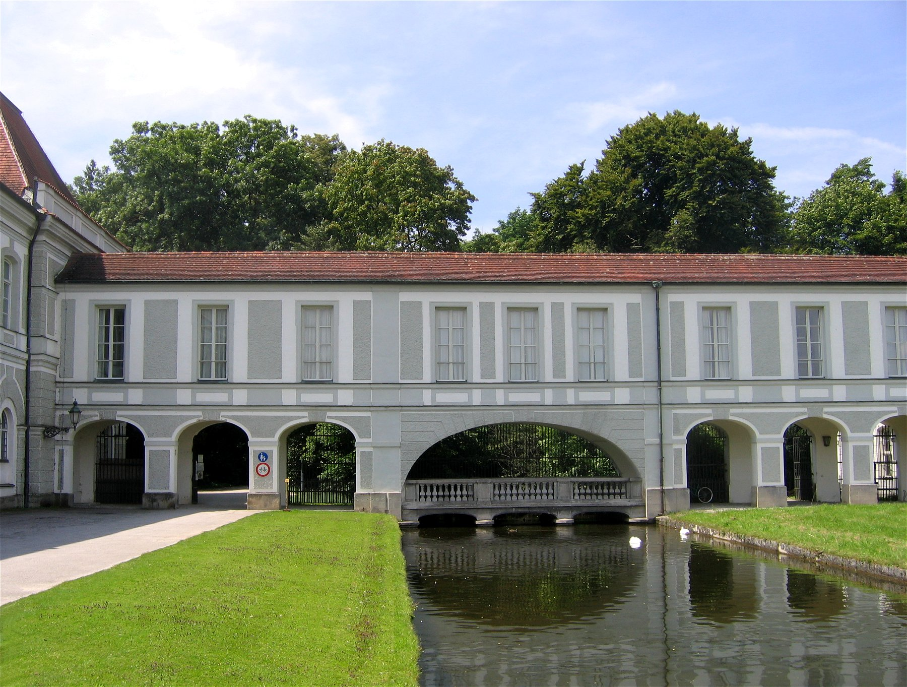 Haupteingang zum Schlosspark Nymphenburg